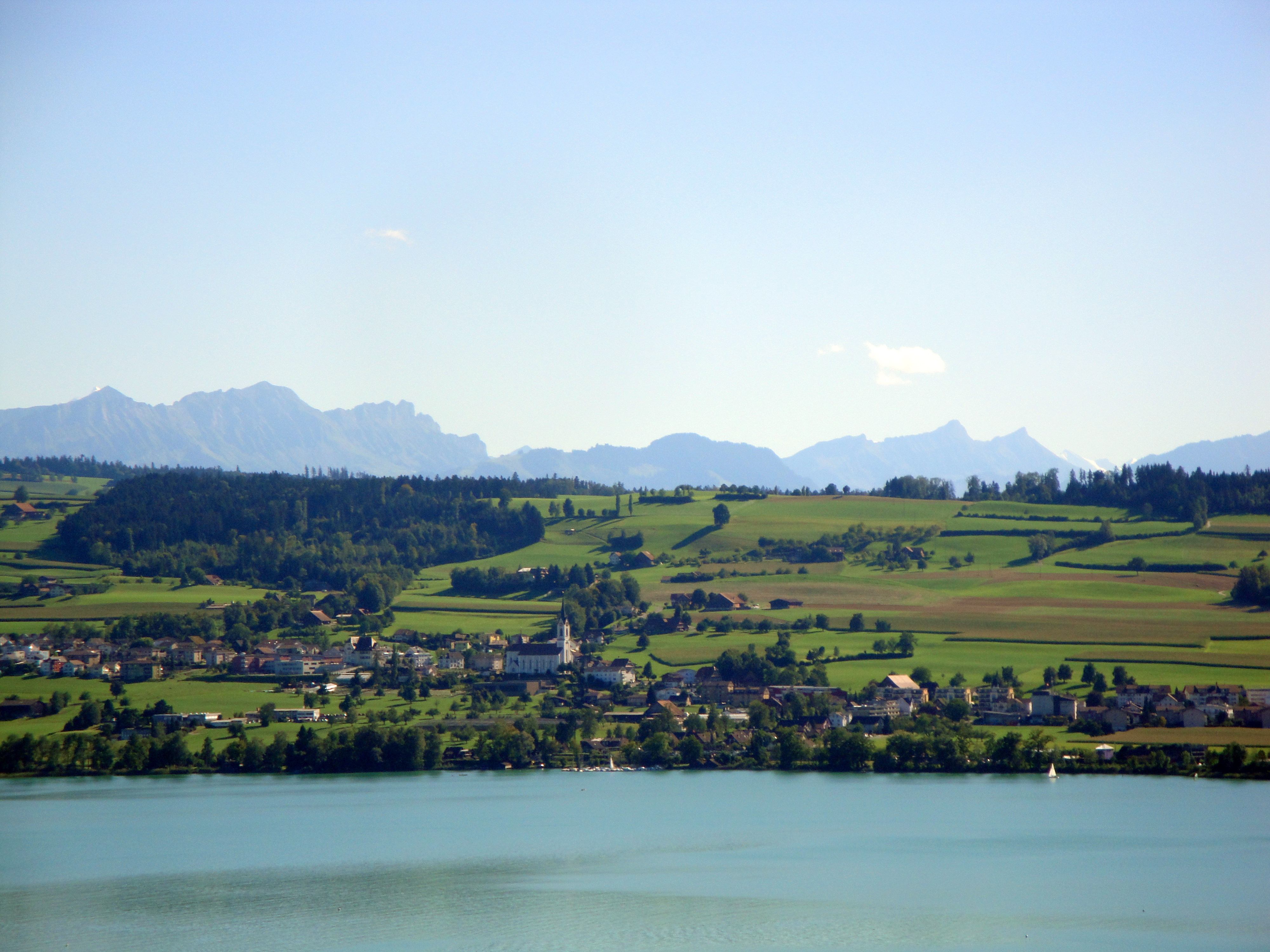 Nottwil (aus Norden)